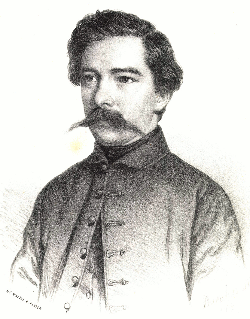 Arany János költő. Barabás Miklós litográfiája